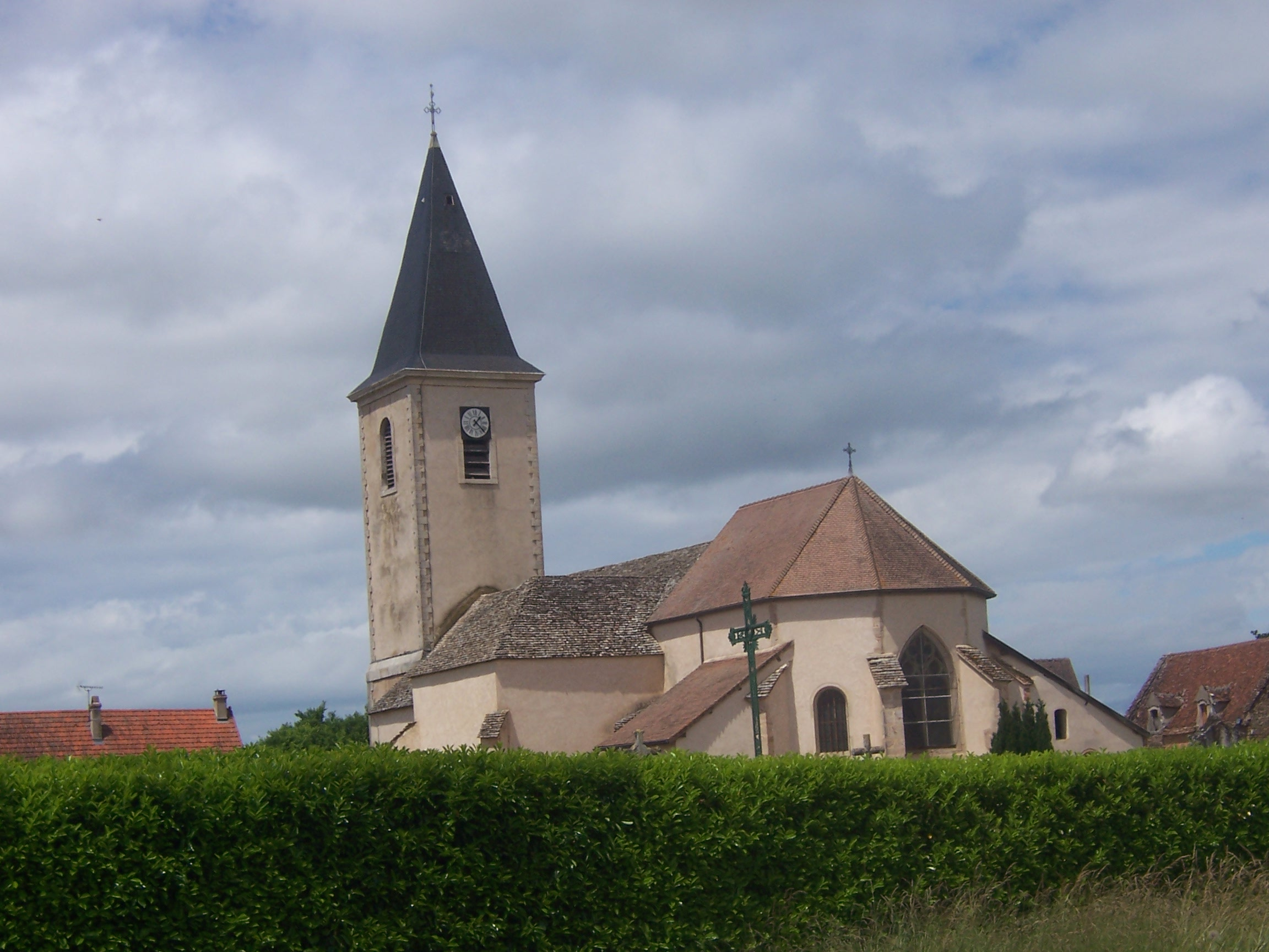 Eglise de Nanton